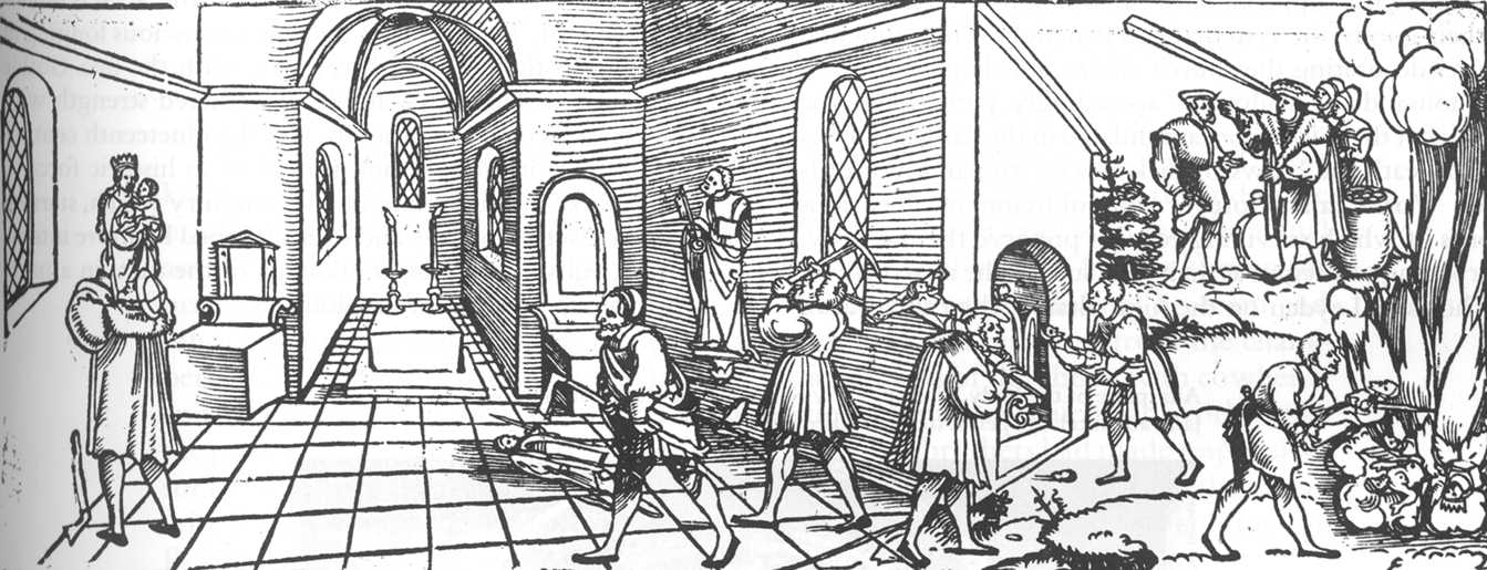 detail